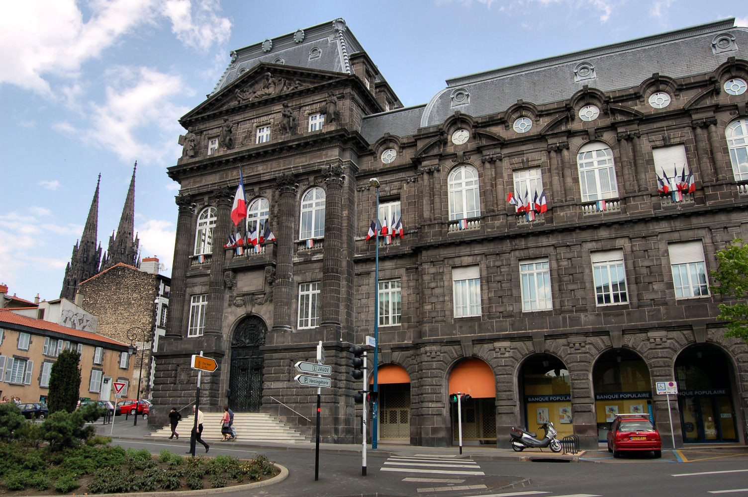 Ancienne préfecture (Clermont-Ferrand, France)